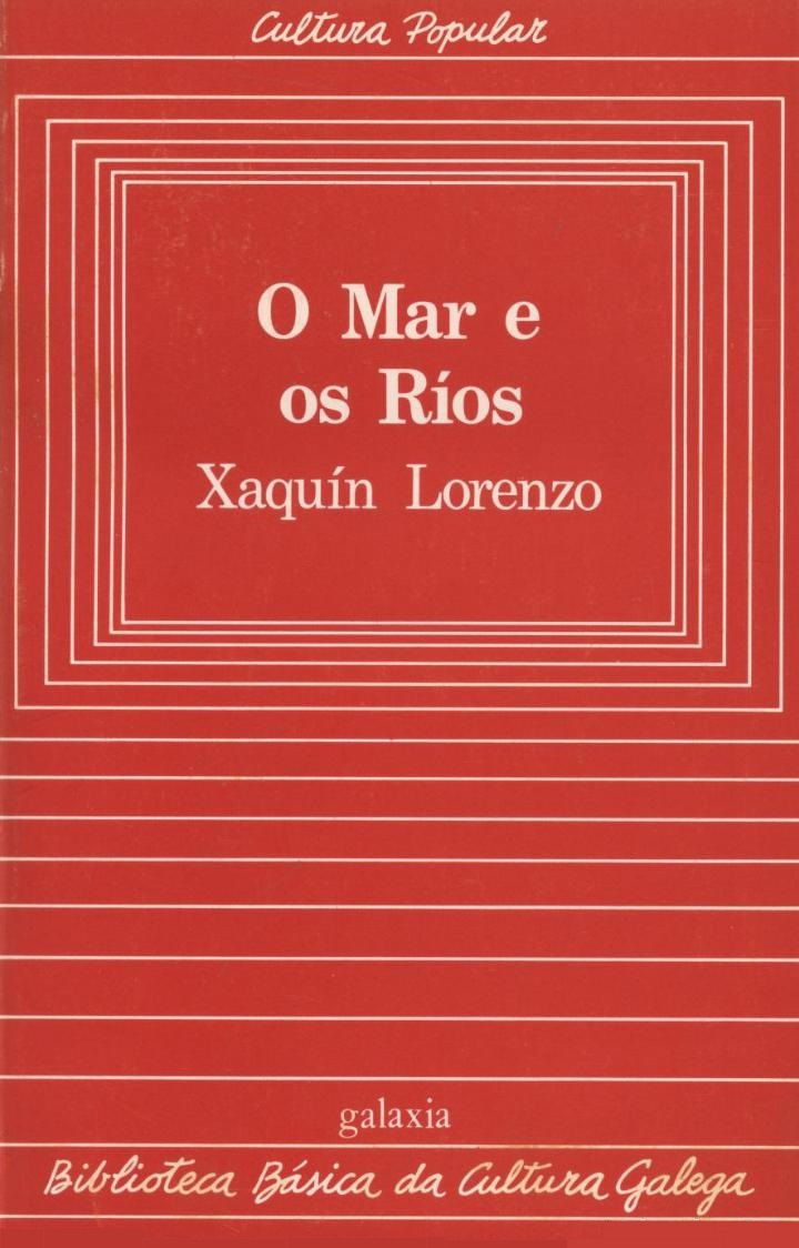 Biblioteca Básica da Cultura Galega, 13, O mar e os ríos, Xaquín Lorenzo